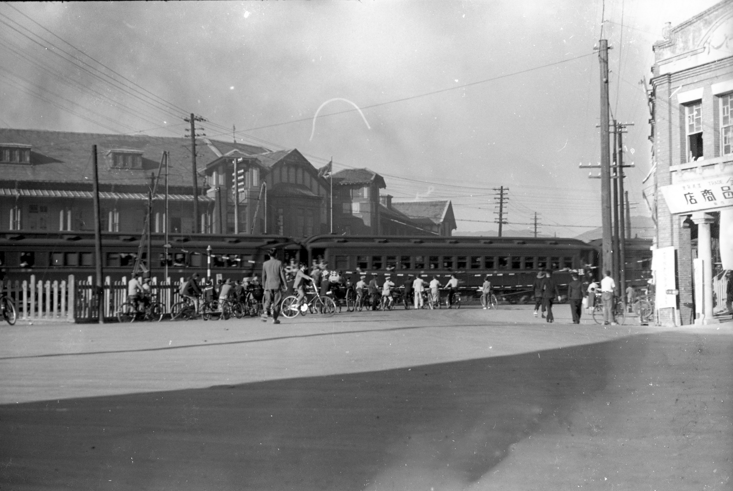 臺灣總督府交通局鐵道部廳舍前。